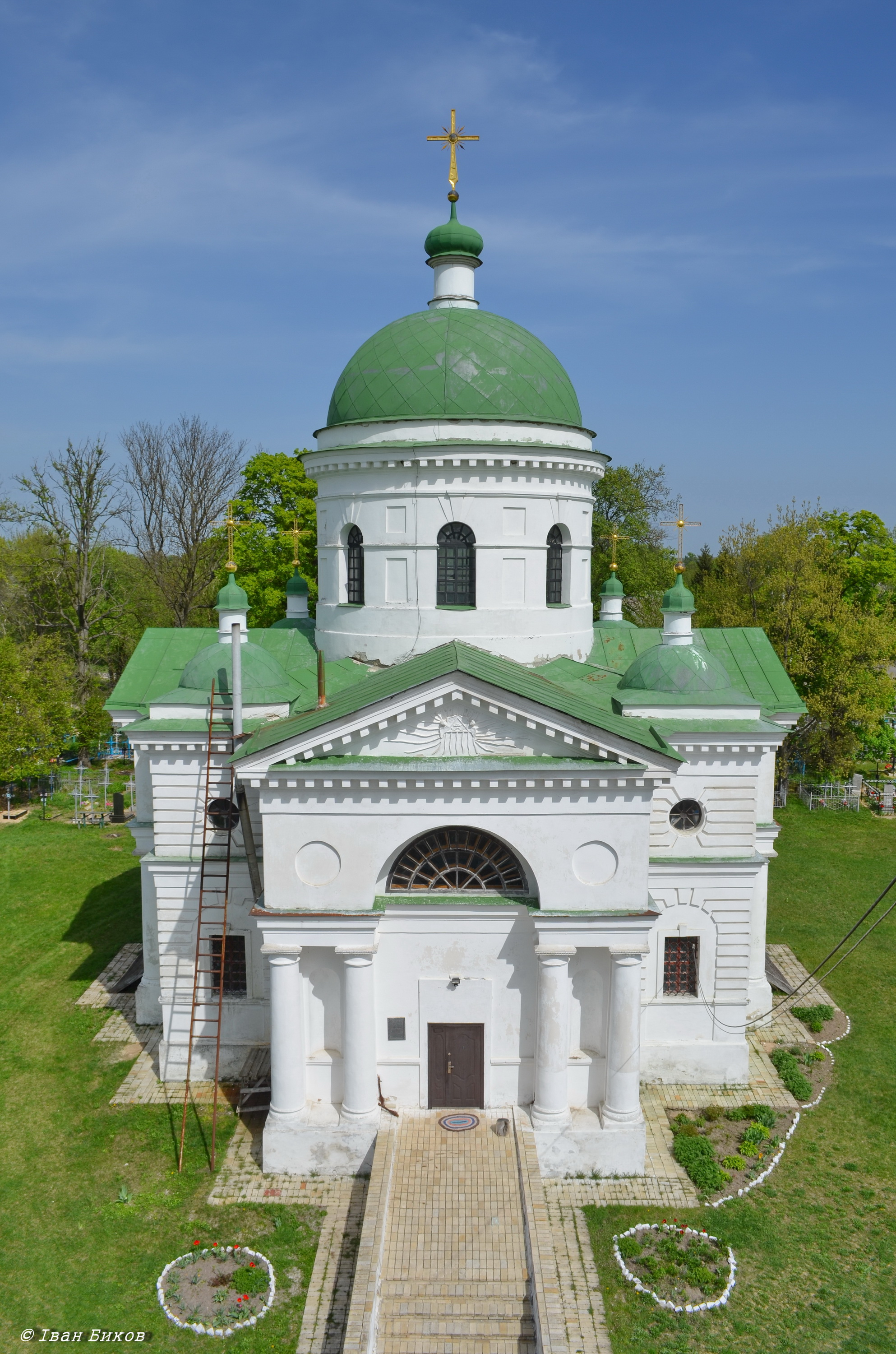 Михайлівська церква (мур.), с.Петрівське